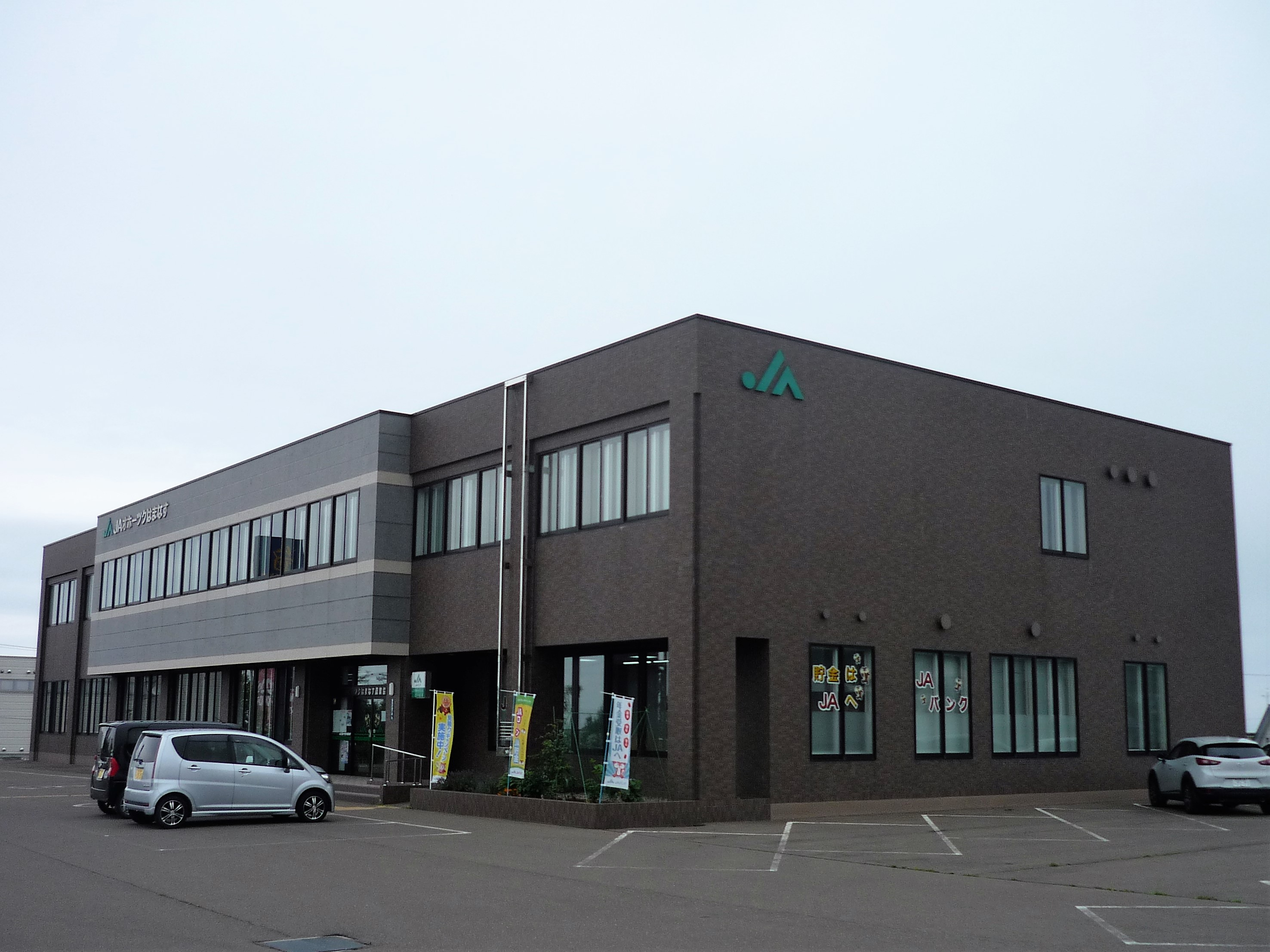 オホーツクはまなす農業協同組合 本所